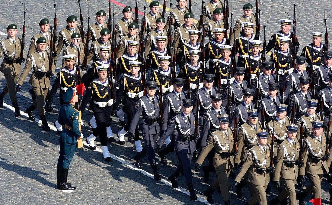 Военный парад, посвящённый 65-летию Победы в Великой Отечественной войне.